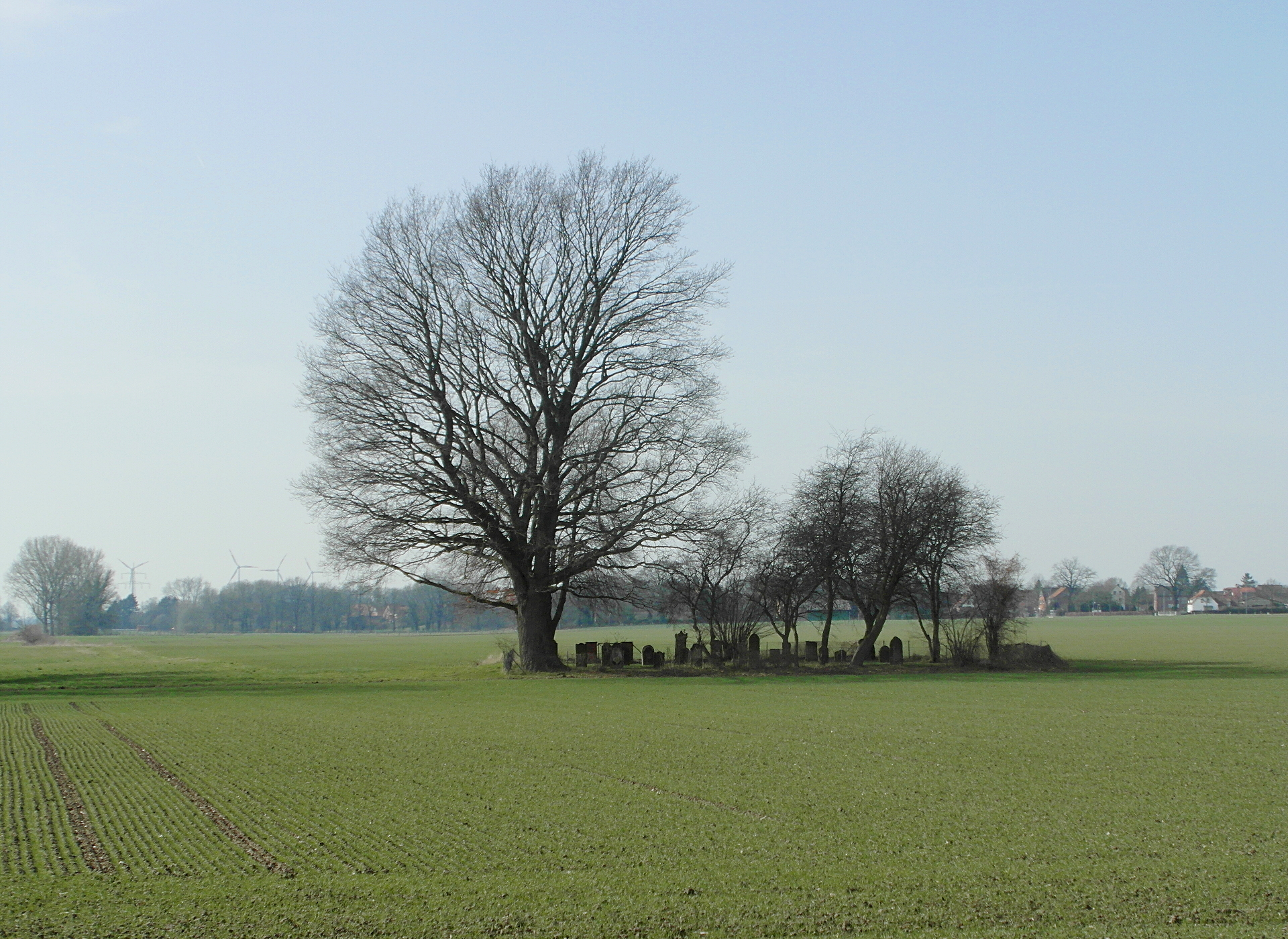 Der jüdische Friedhof Groß Munzel in der Feldmark nahe Barrigsen. Foto von der Brücke der Barrigser Straße über die Möseke.